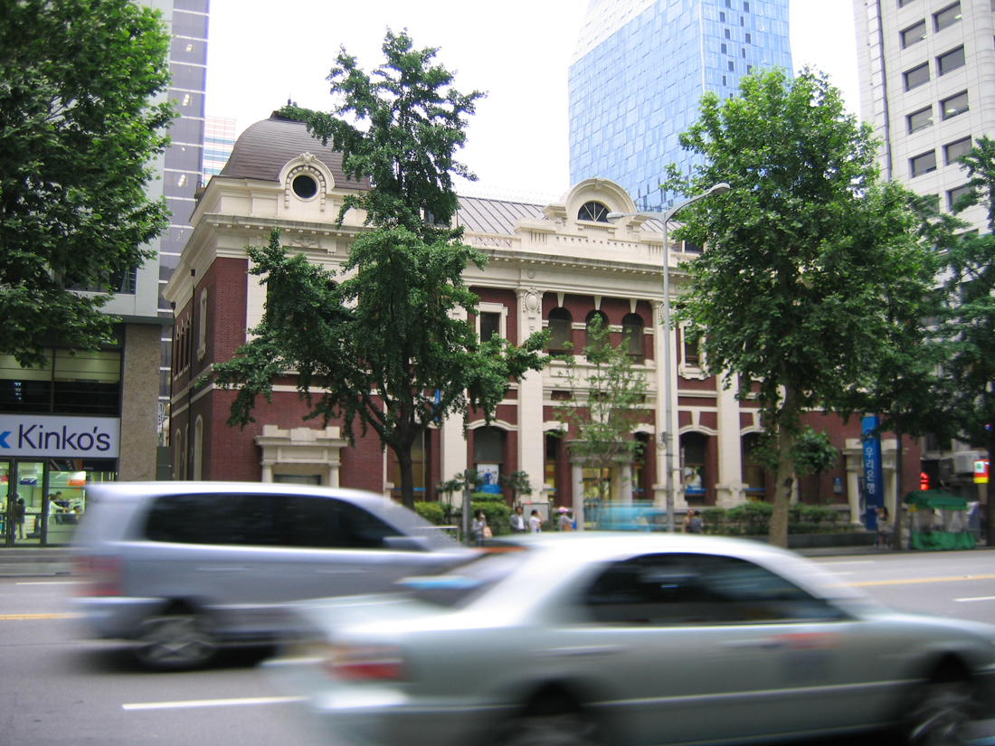 Gwangtonggwan in Seoul, taken during summer of 2007.